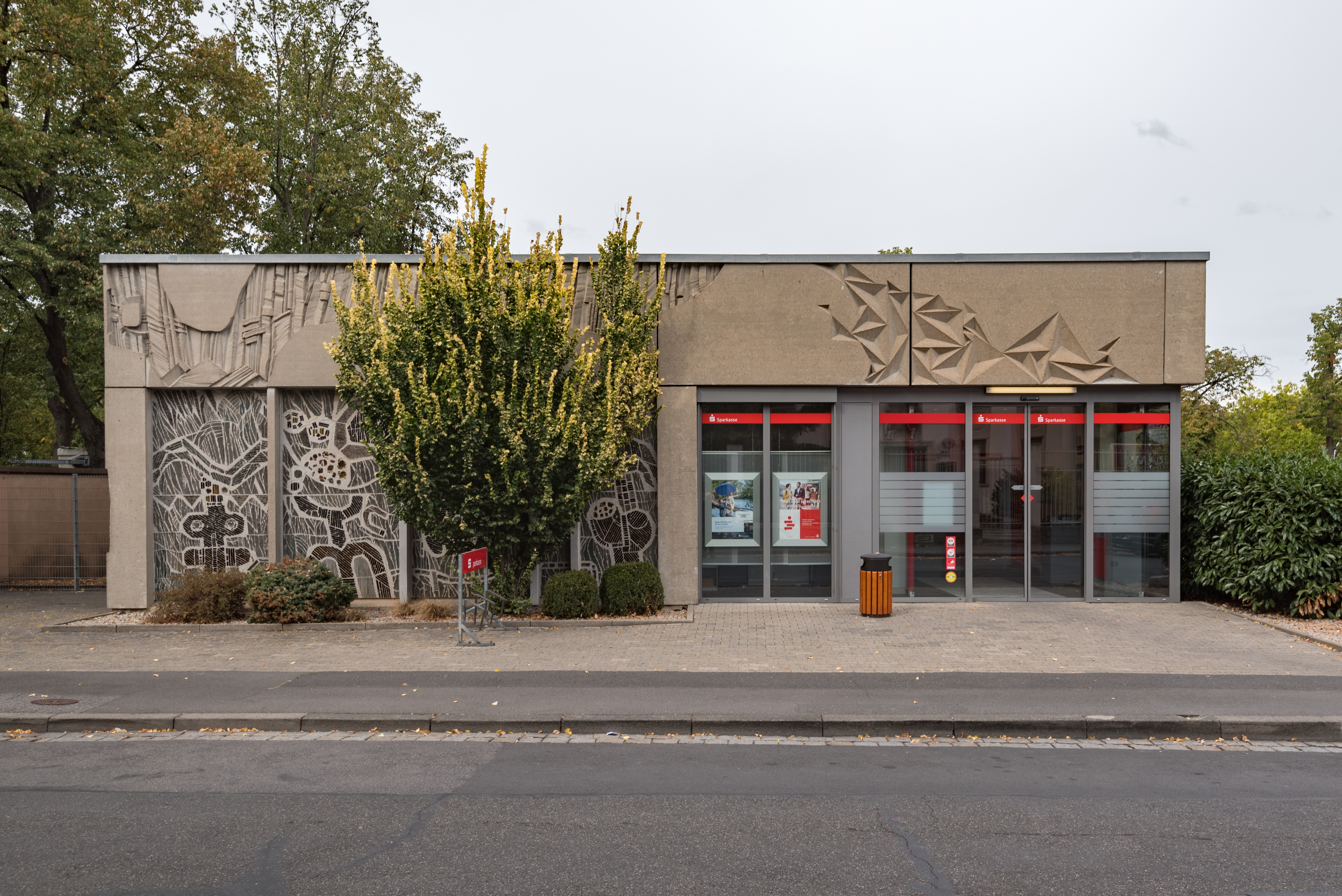 Carl-Orff-Straße 2 SchweinfurtThis is a photograph of an architectural monument.